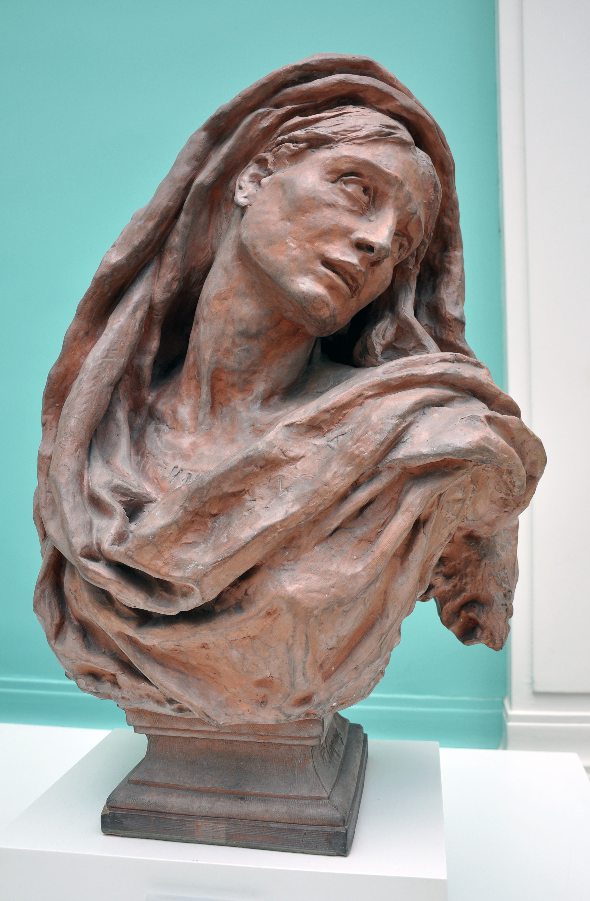 Mater Dolorosa, par Jean-Baptiste Carpeaux. Terre cuite ( 1869-1870 ).Musée des Beaux-Arts de Valenciennes.